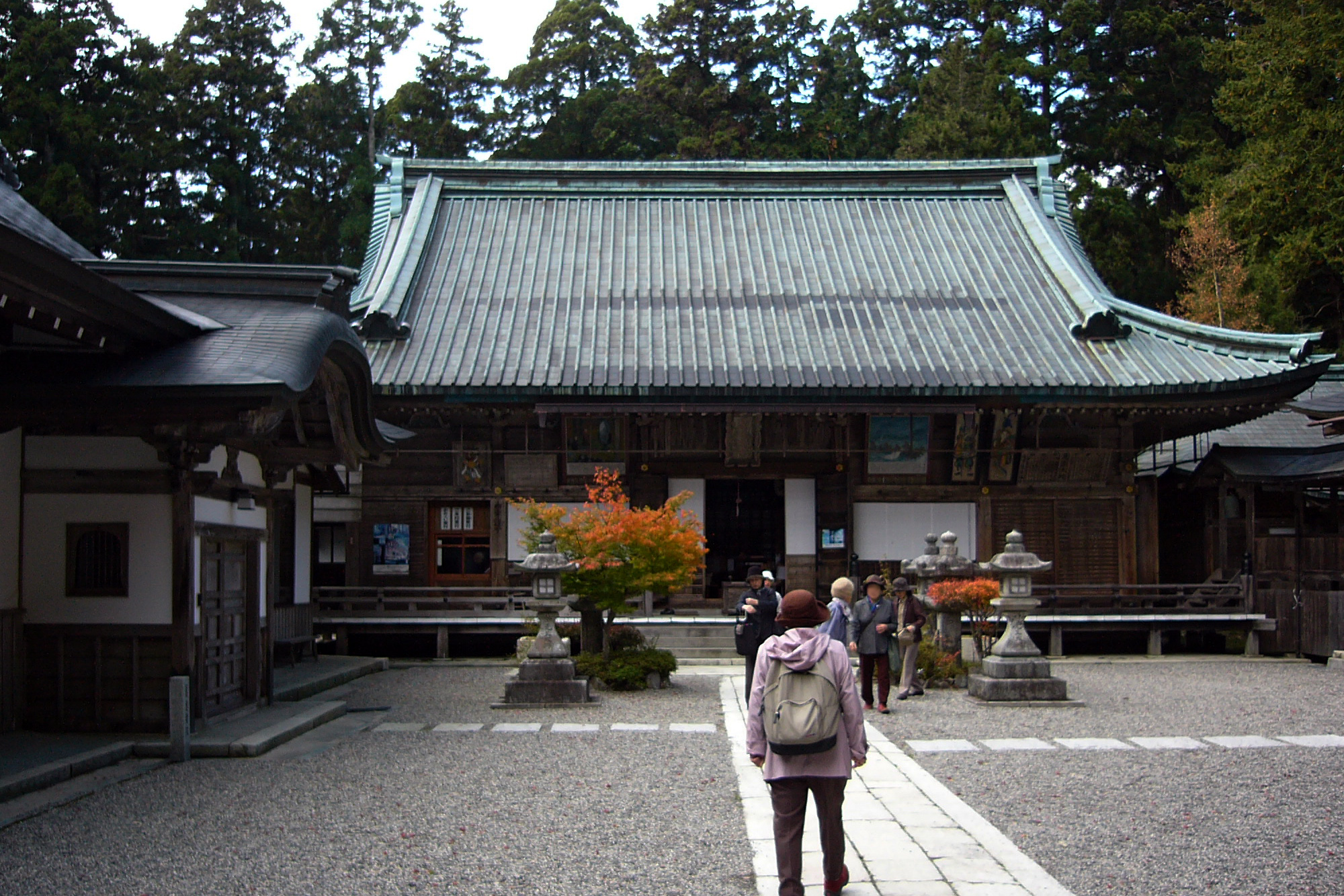 Enryaku-ji_Ganzandaishido (延暦寺元三大師堂), Otsu, Shiga prefecture, Japan